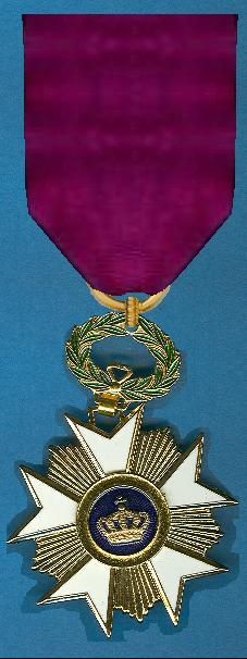 Kroonorde van Belgie Ridder. Scan van een kruis in mijn verzameling. Het lint is getekend